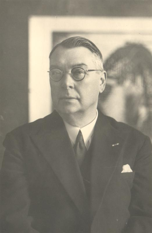 Kees Ivens in 1936 (fotograaf onbekend)